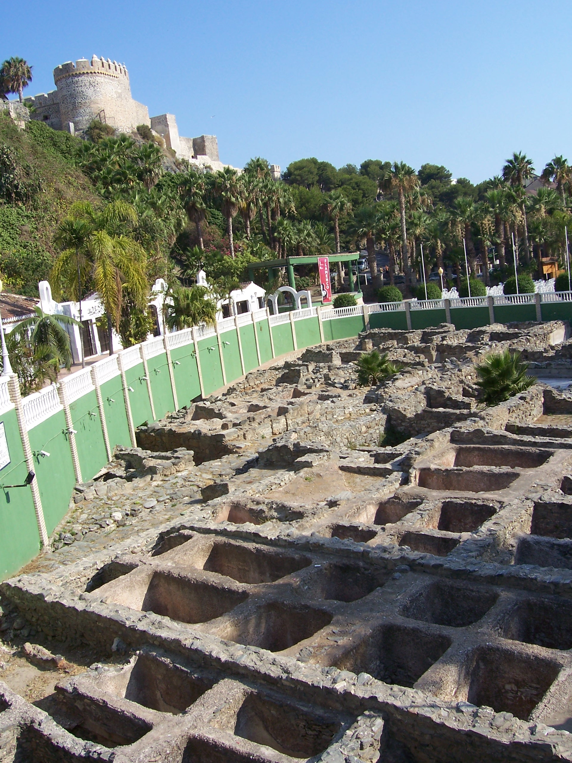 vestiges